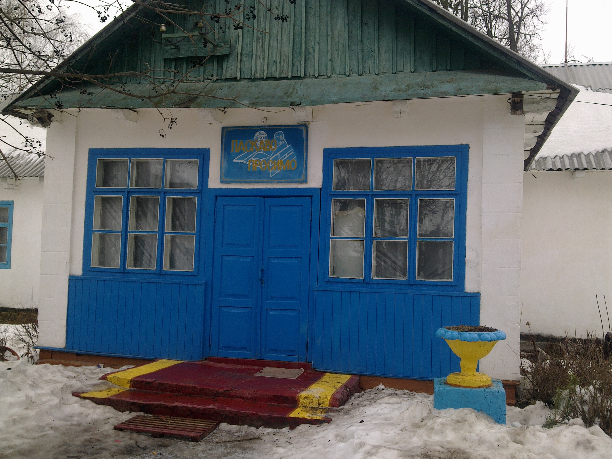 Фотографія зроблена в с.Данчиміст, Костопільського району, Рівненської області. зображена загальноосвітня школа